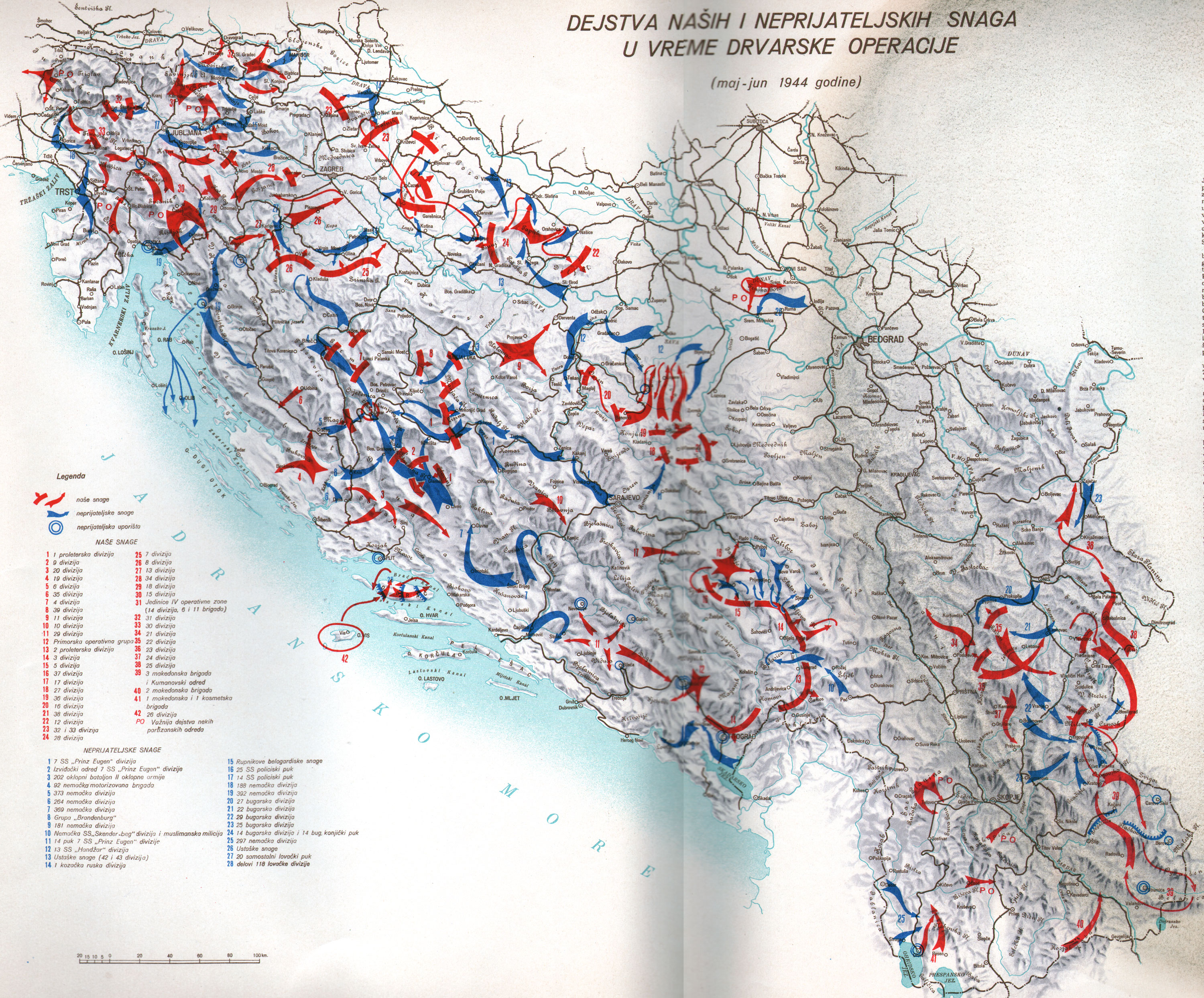 Srpskohrvatski / српскохрватски: Borbe širom Jugoslavije tokom desanta na Drvar (maj-jun 1944 godine).